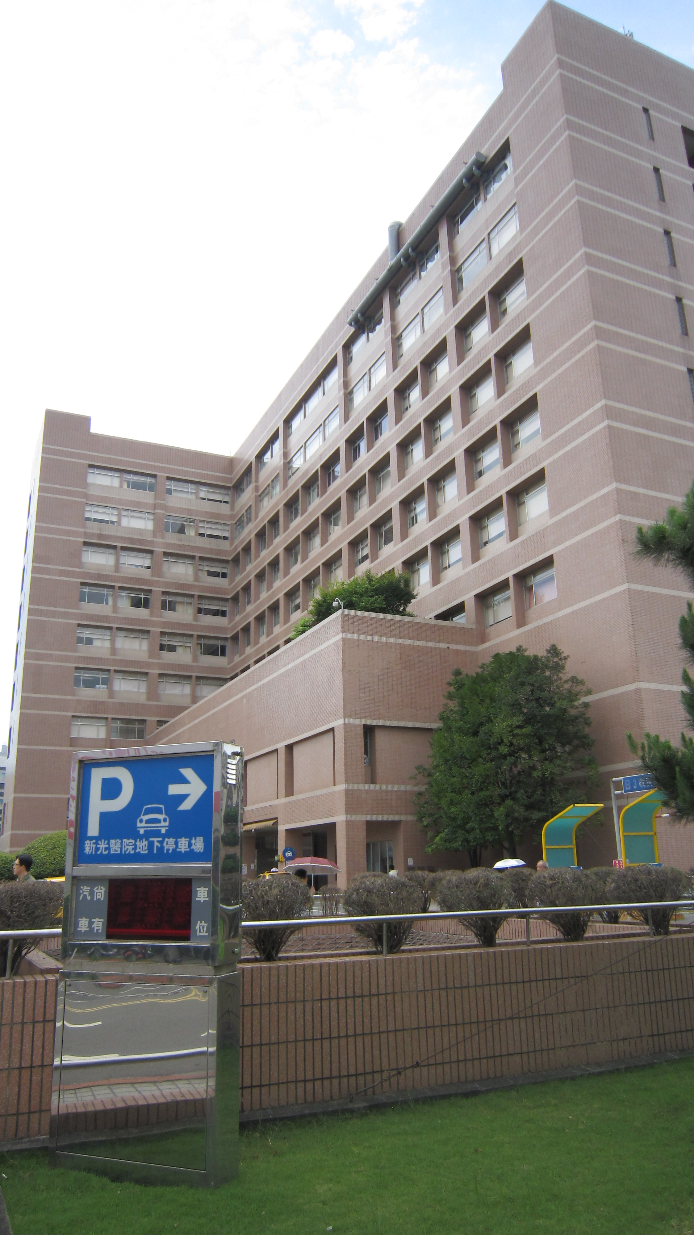 中文（台灣）: 新光吳火獅紀念醫院及其地下停車場標示牌。